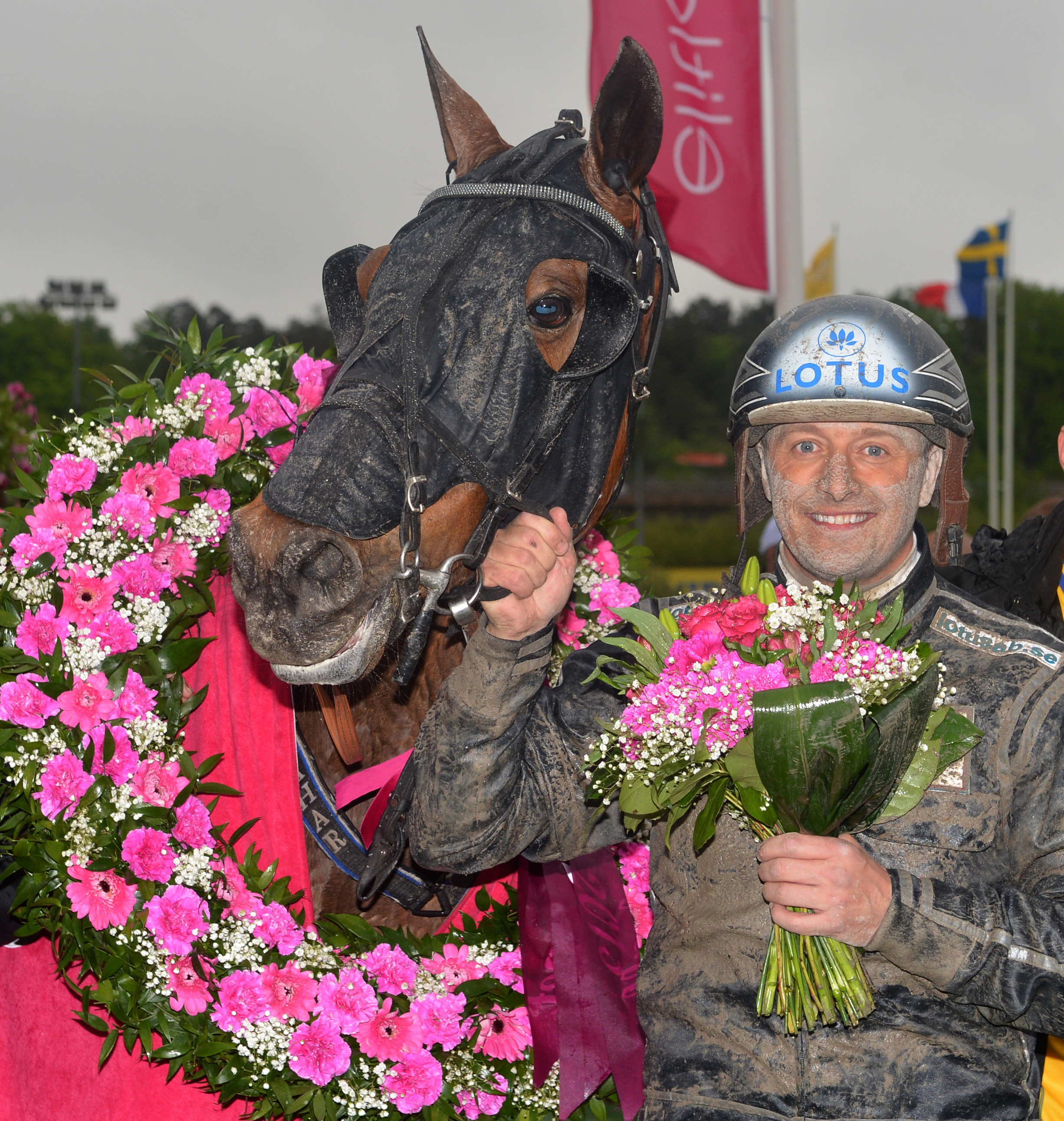 Kusken Robert Bergh och hästen Nahar efter segern i Elitloppet 2013 på Solvalla.